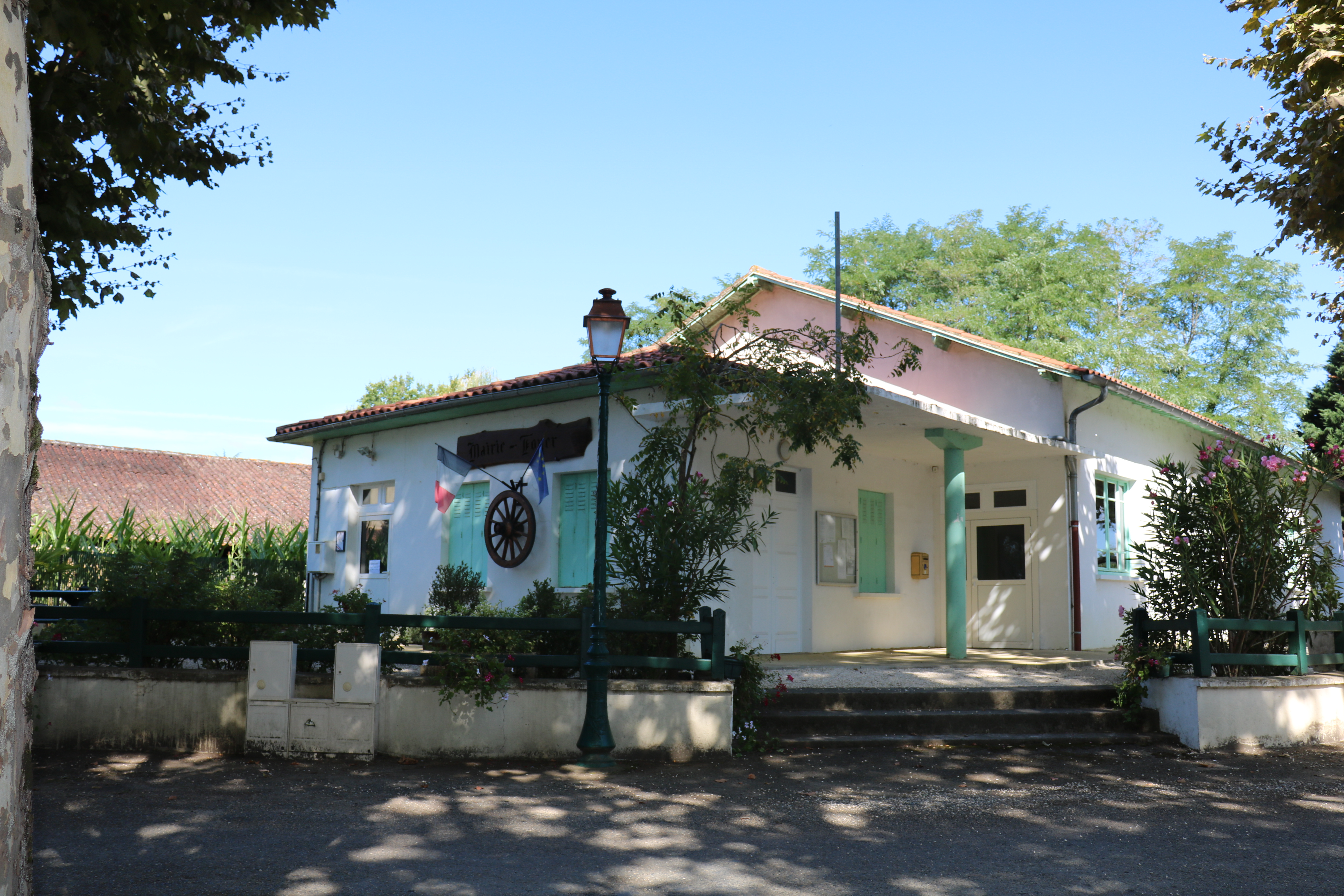 Vue de la mairie de la commune de Sion (France - Région Occitanie - Département du Gers)